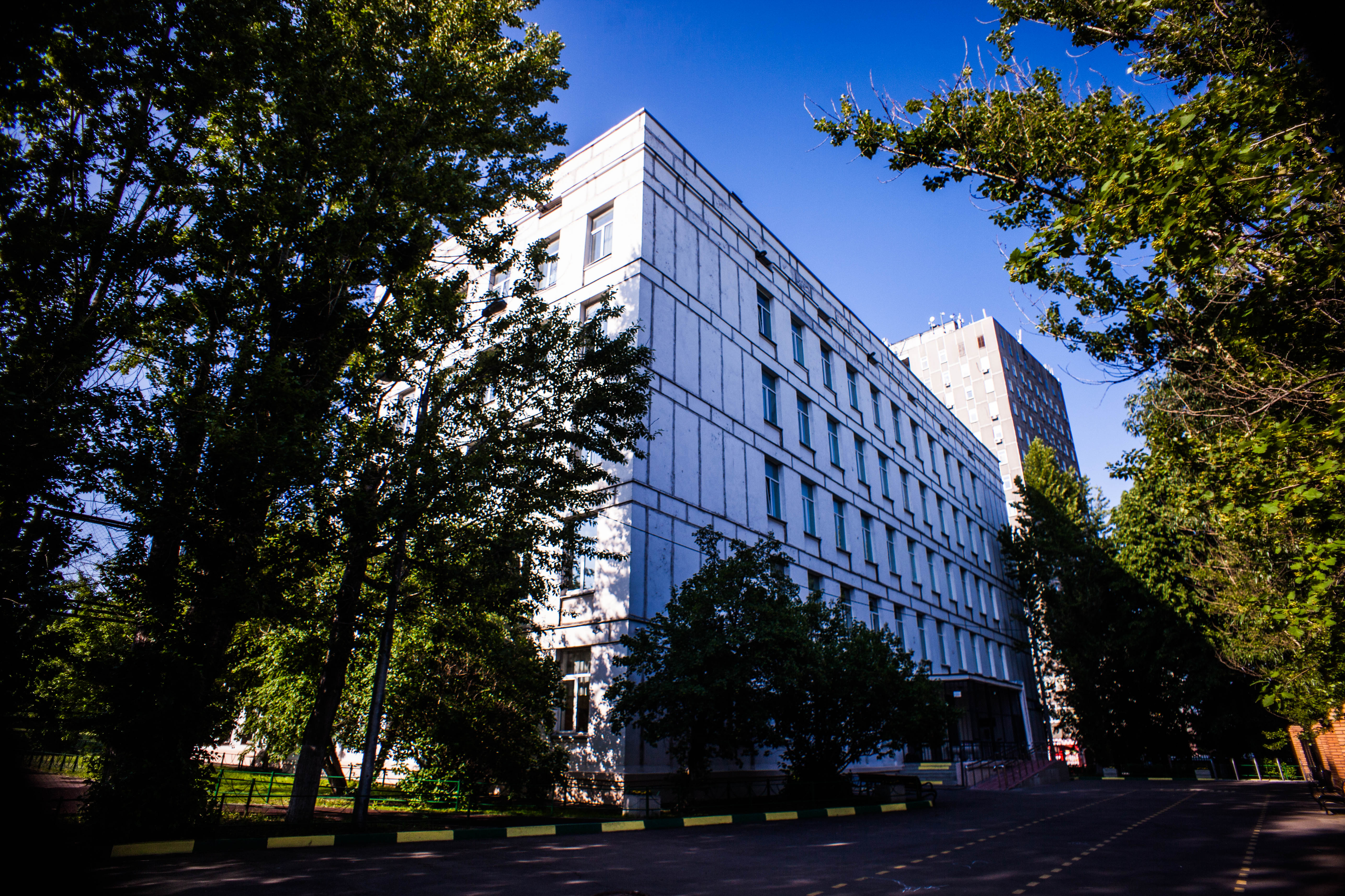 Школа №157